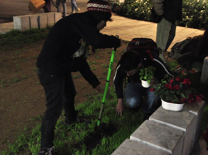 מפגש גינון גרילה ראשון בחיפה-הדר